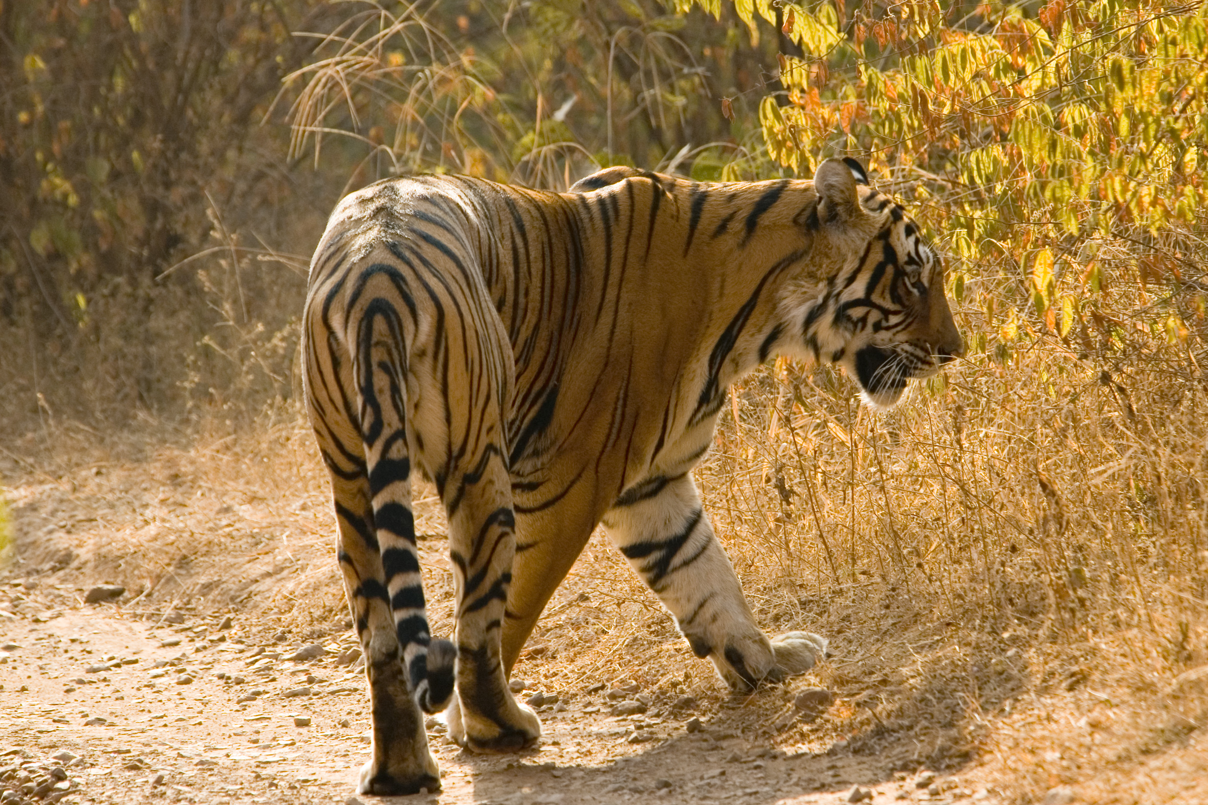 tiger Panthera tigris